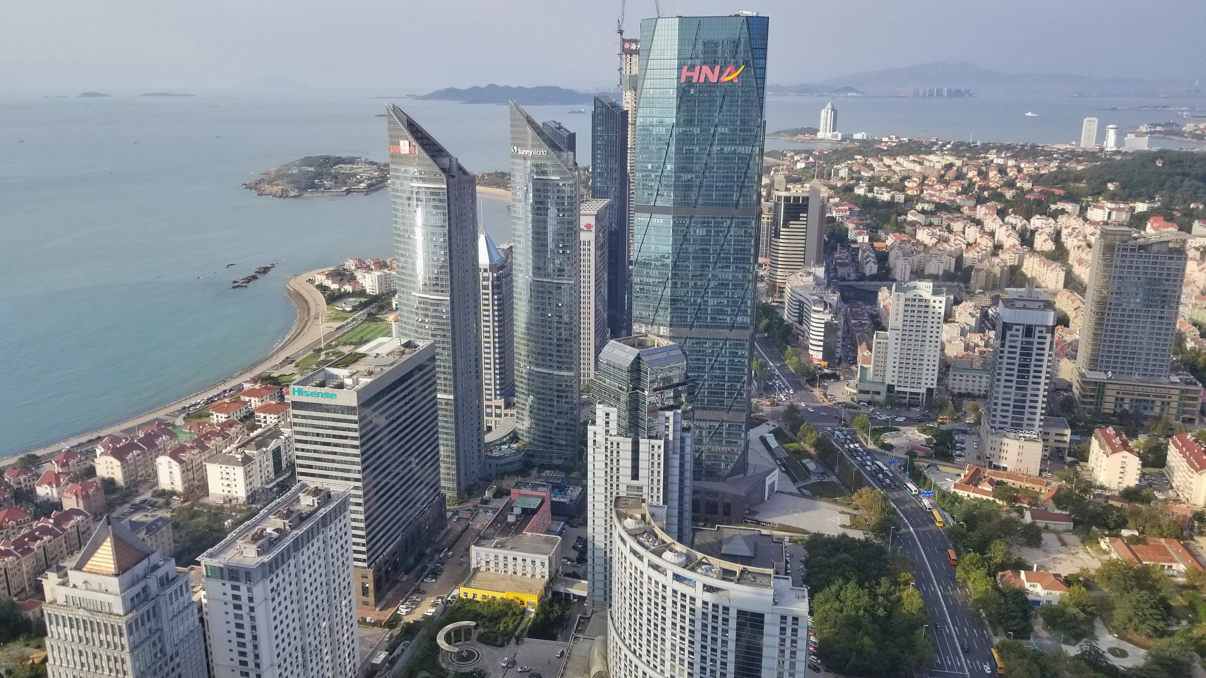 Qingdao